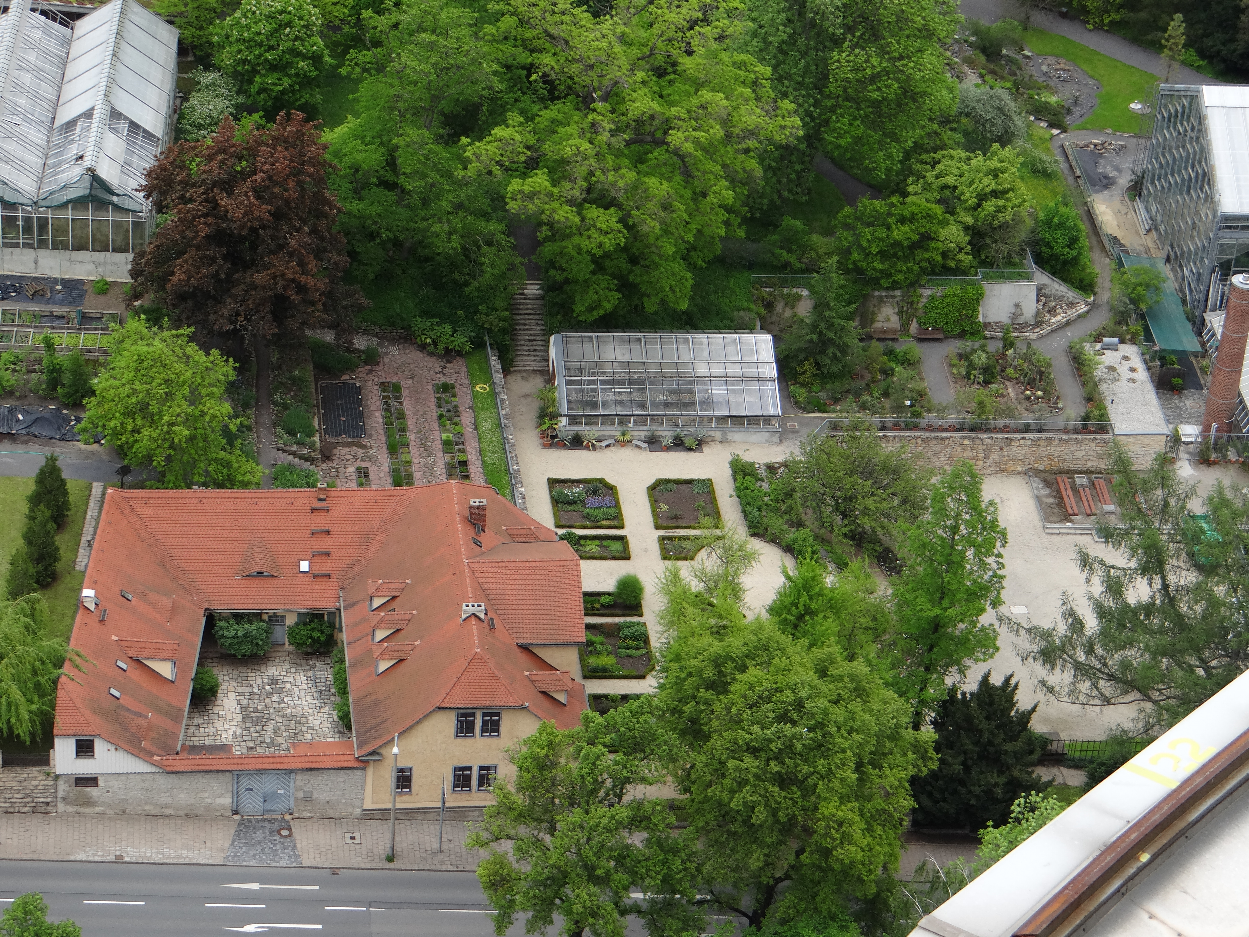 ehemaliges Prüfungsamt der Biologisch-Pharmazeutischen Fakultät Jena; aufgenommen vom Jentower